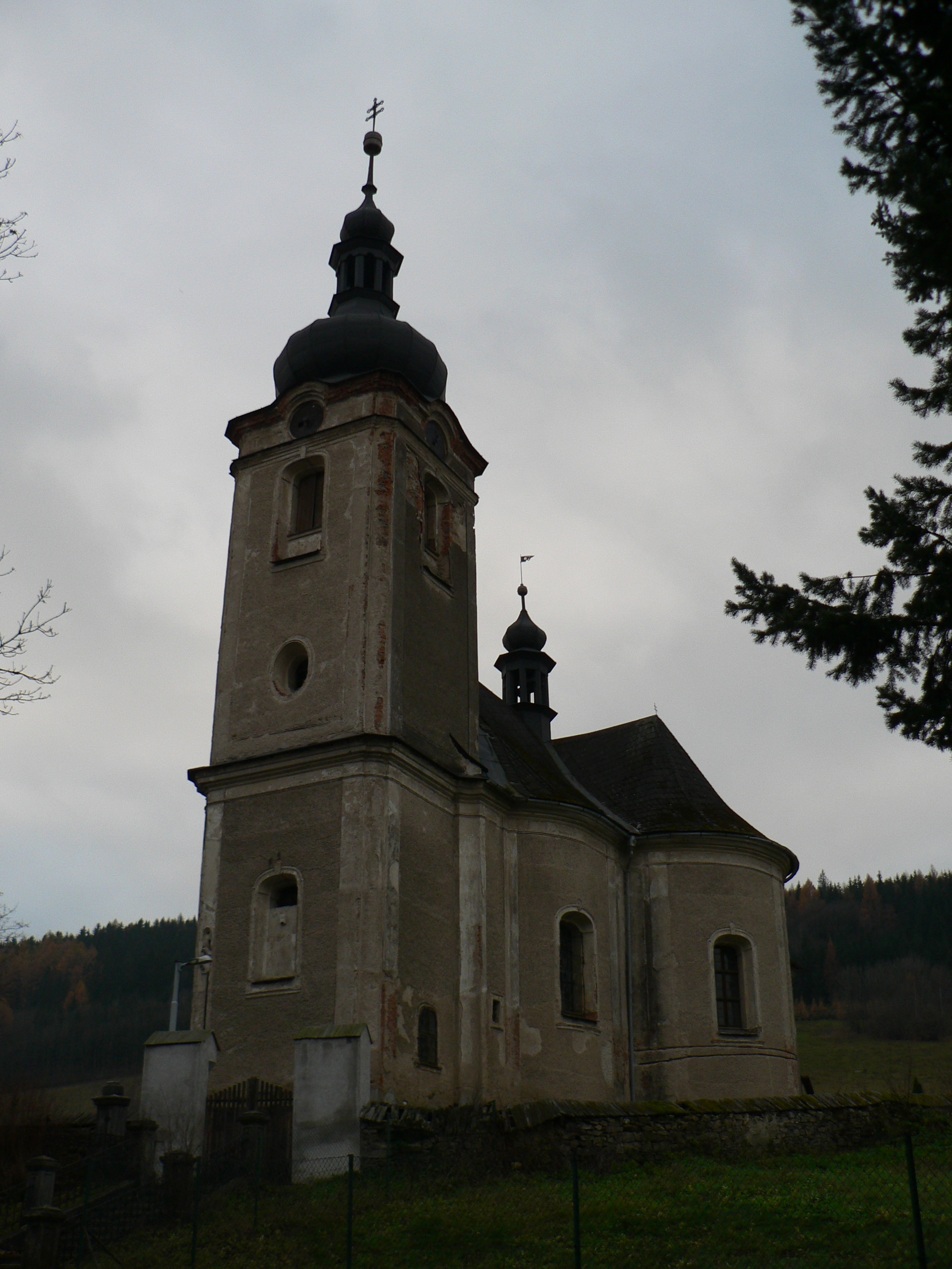 Kostel svatého Michala (Rejchartice)